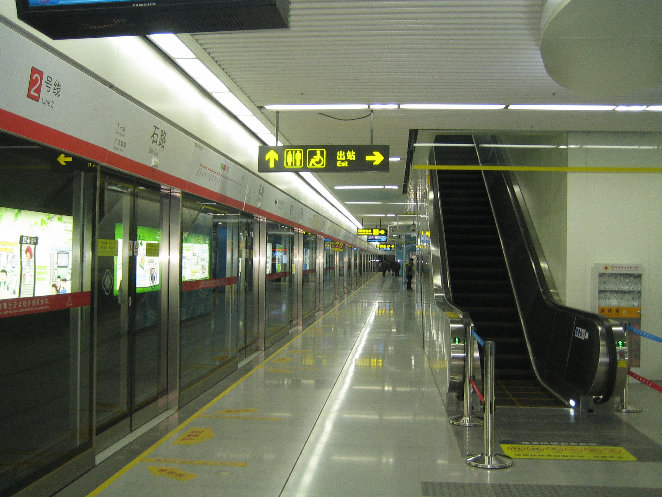 中文（中国大陆）: 苏州地铁2号线石路站站台